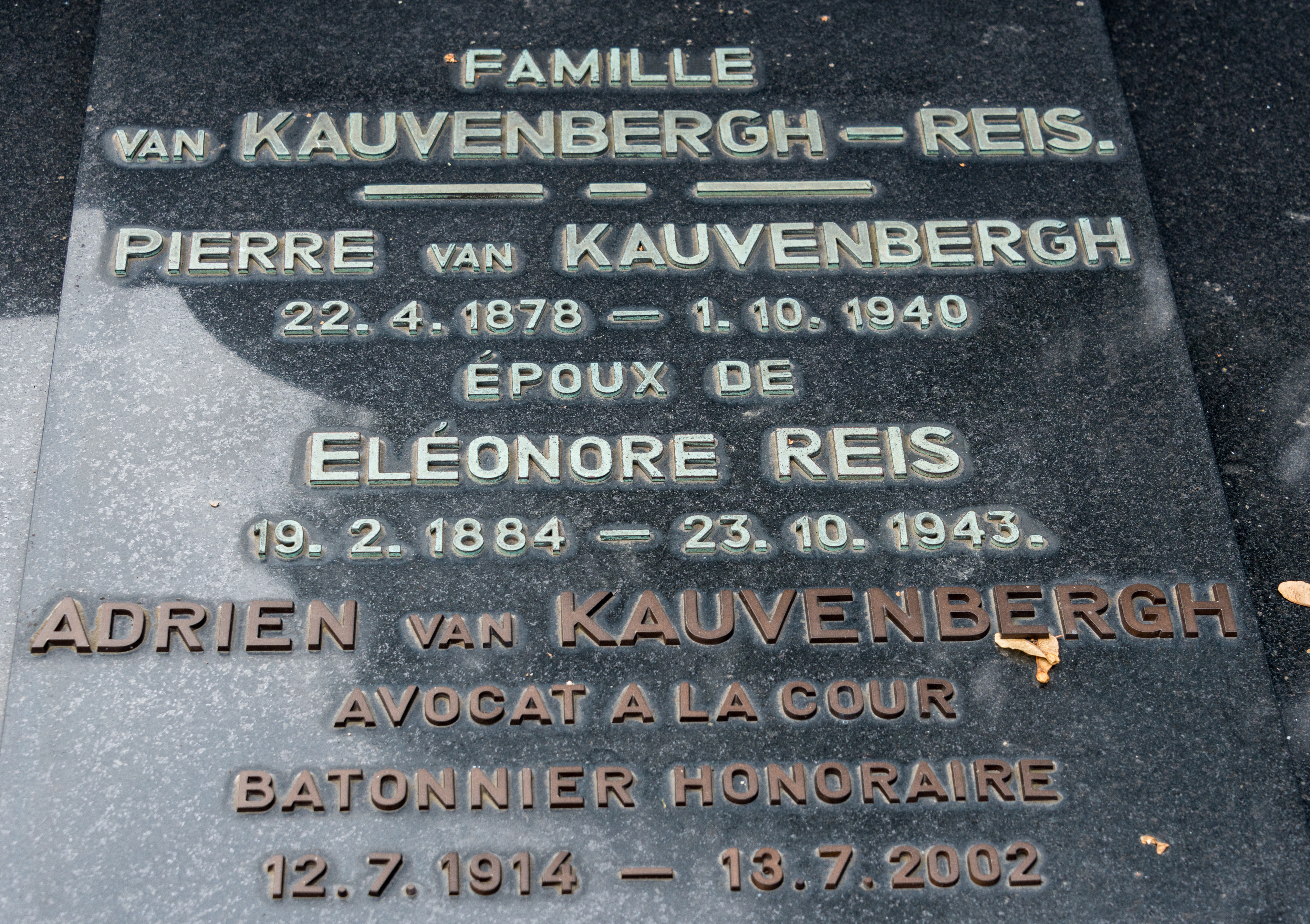 D'Familljegraf van Kauvenbergh um Nikloskierfecht.